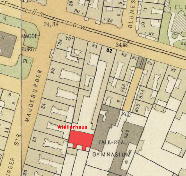 Ausschnitt aus dem Straube-Plan von 1910, Quelle: histomap-berlin.de (Landesarchiv Berlin)